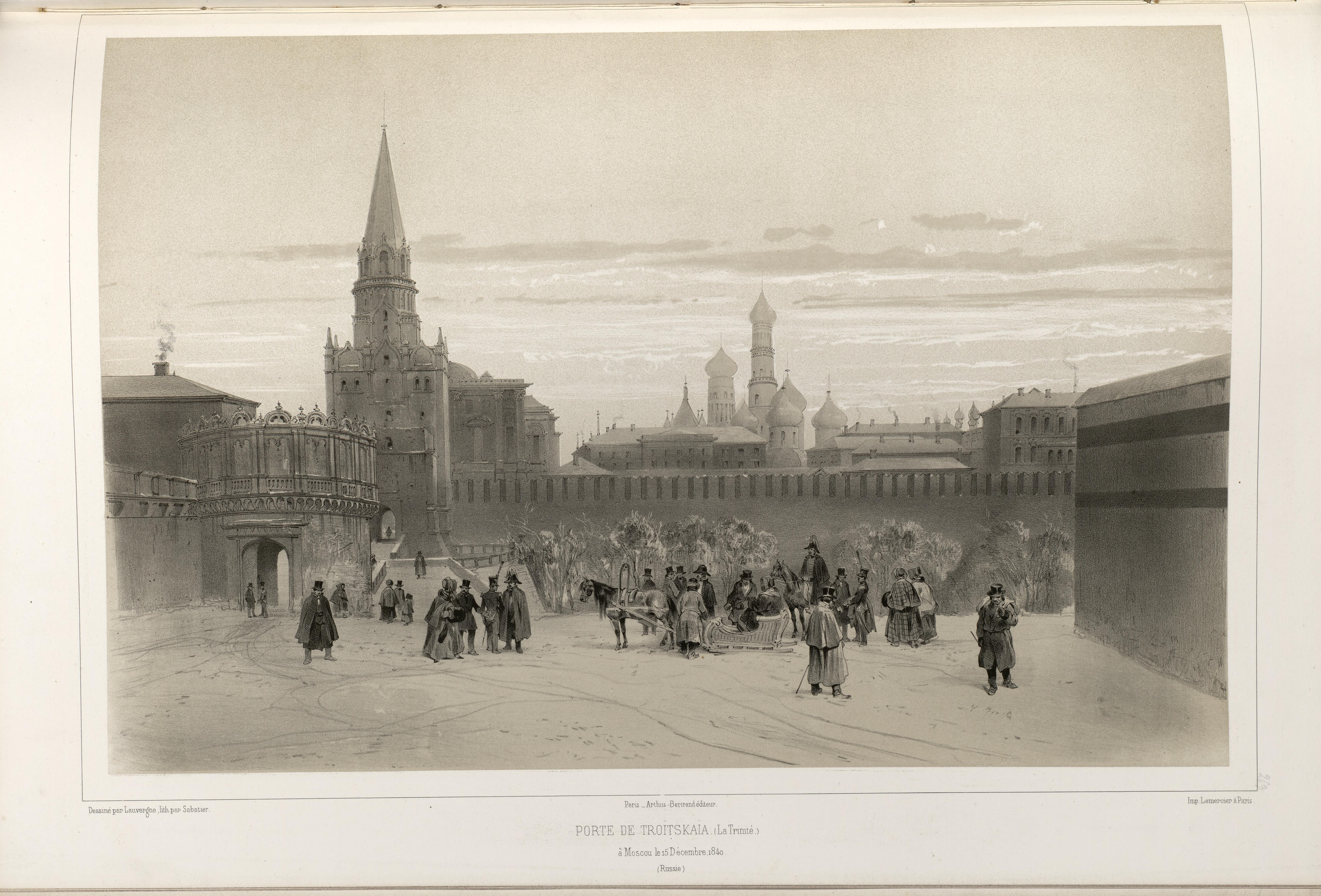 Illustrasjon hentet fra boken "Voyages de la Commission scientifique du Nord, en Scandinavie, en Laponie, au Spitzberg et aux Feröe" av ukjent forfatter og utgitt av Arthus BertrandParis : Arthus Bertrand, [1852] (Paris, [1852])